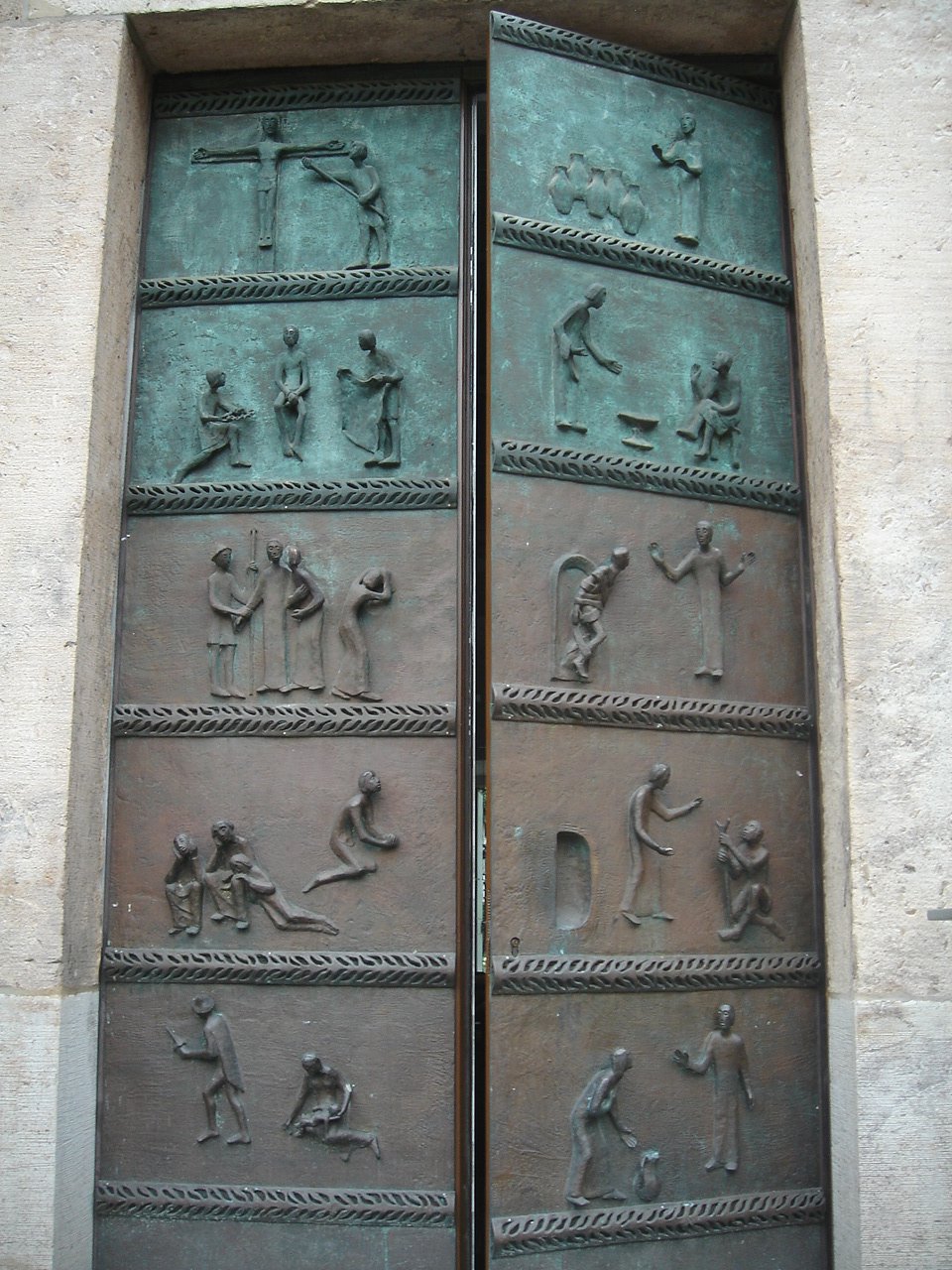 Portal der Hildener Reformationskirche, Bronze, gestaltet von Ulrich Henn (1925-2014).